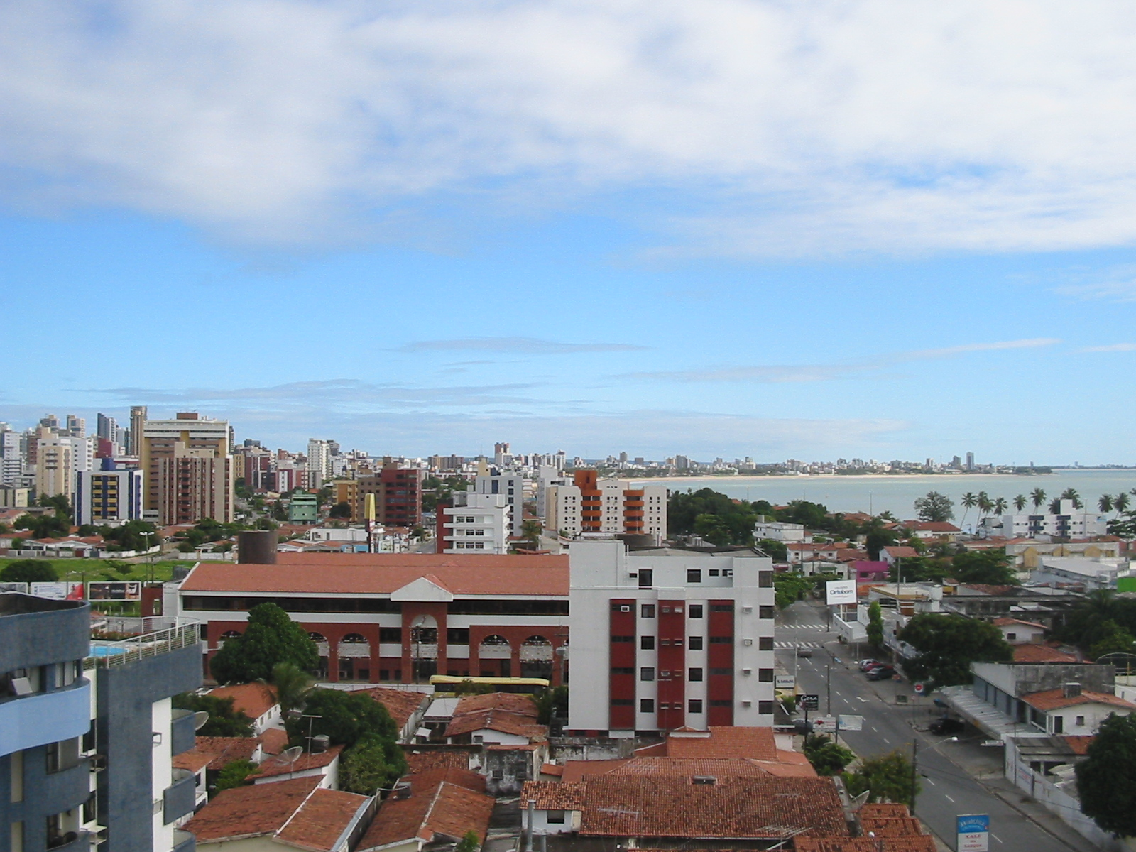 João Pessoa (Paraíba), Brasil. Vista do Bairro Tambaú (ao fundo, bairros de Manaíra e do Bessa). Foto tirada desde o Hotel Caiçara. João Pessoa (Paraíba), Brasil. Tambaú district.